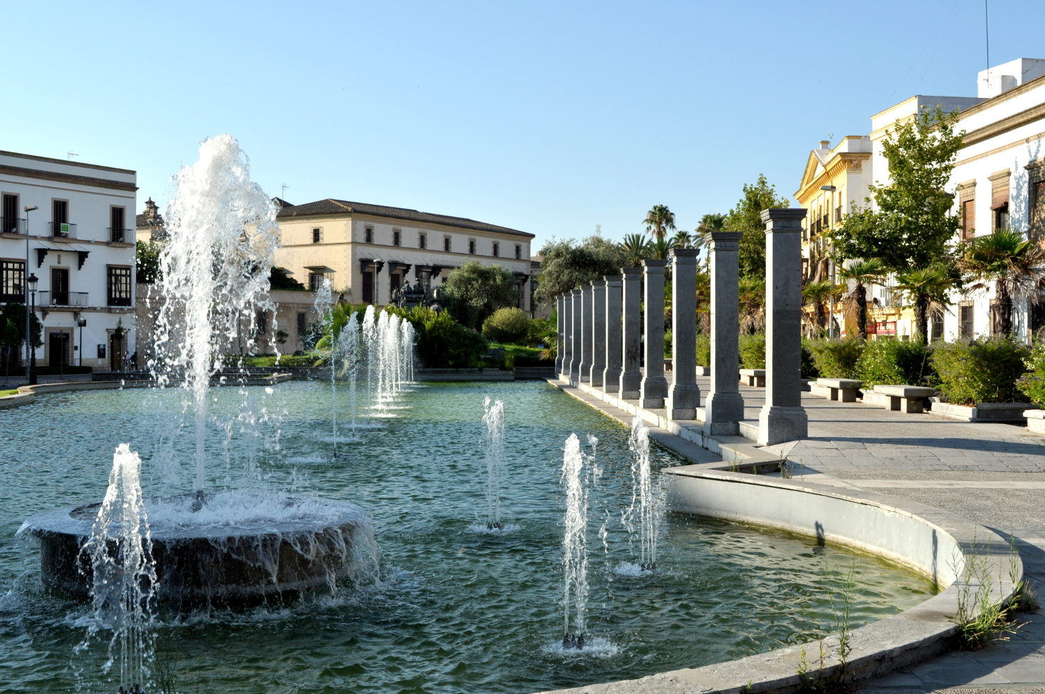 Plaza del Mamelón, Jerez de la Frontera